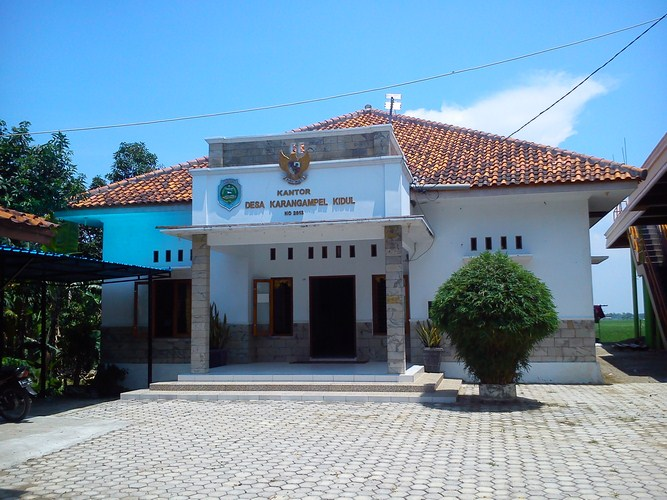 Desa